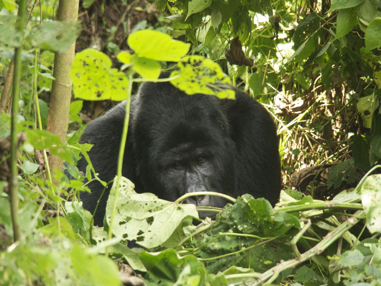 Oruzogo Mountain Gorilla Uganda